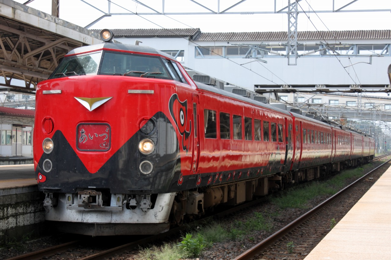 485系あかべぇ塗装による特急「あいづ」